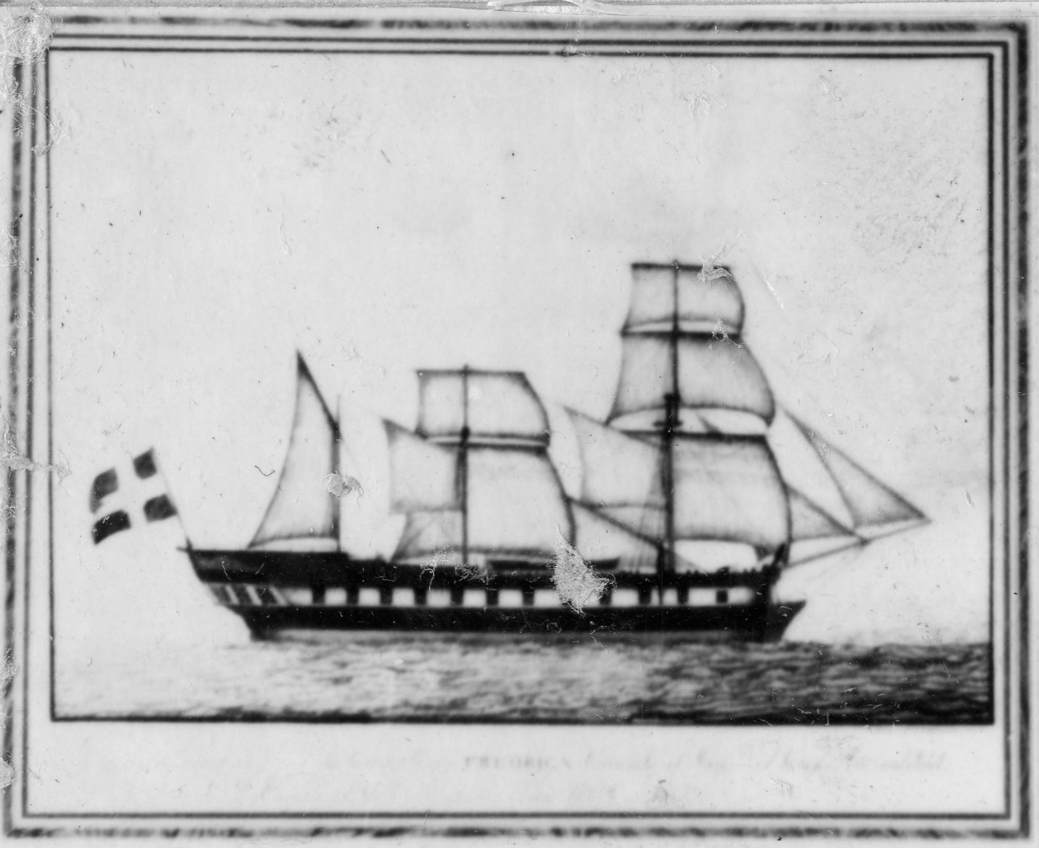 Fregattskeppet Fredrica. Serie om fem akvareller i gemensam ram. Ram: Förgylld Avbildad - namn: FREDRICA Avbildad - namn: Engelhart, C D